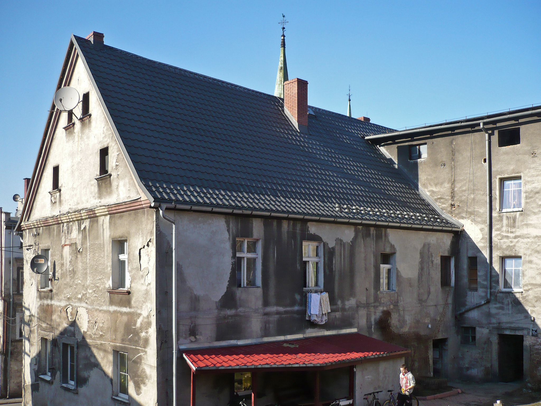 Nowa Ruda, ul. Kościelna 12 - dom, tył